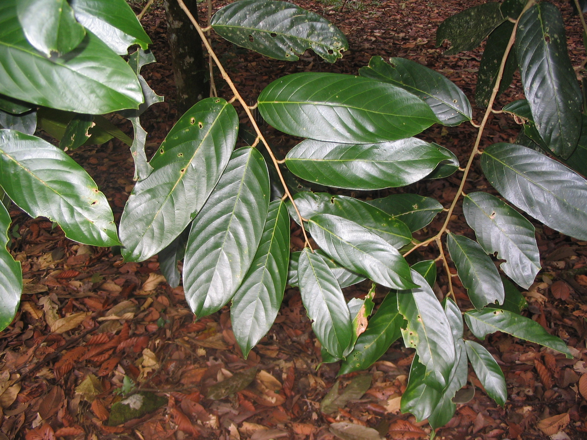 Shorea maxima - branche basse - Forest Research Institute of Malaysia - Kepong - Malaysia